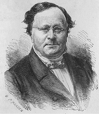 Thomas Overskou